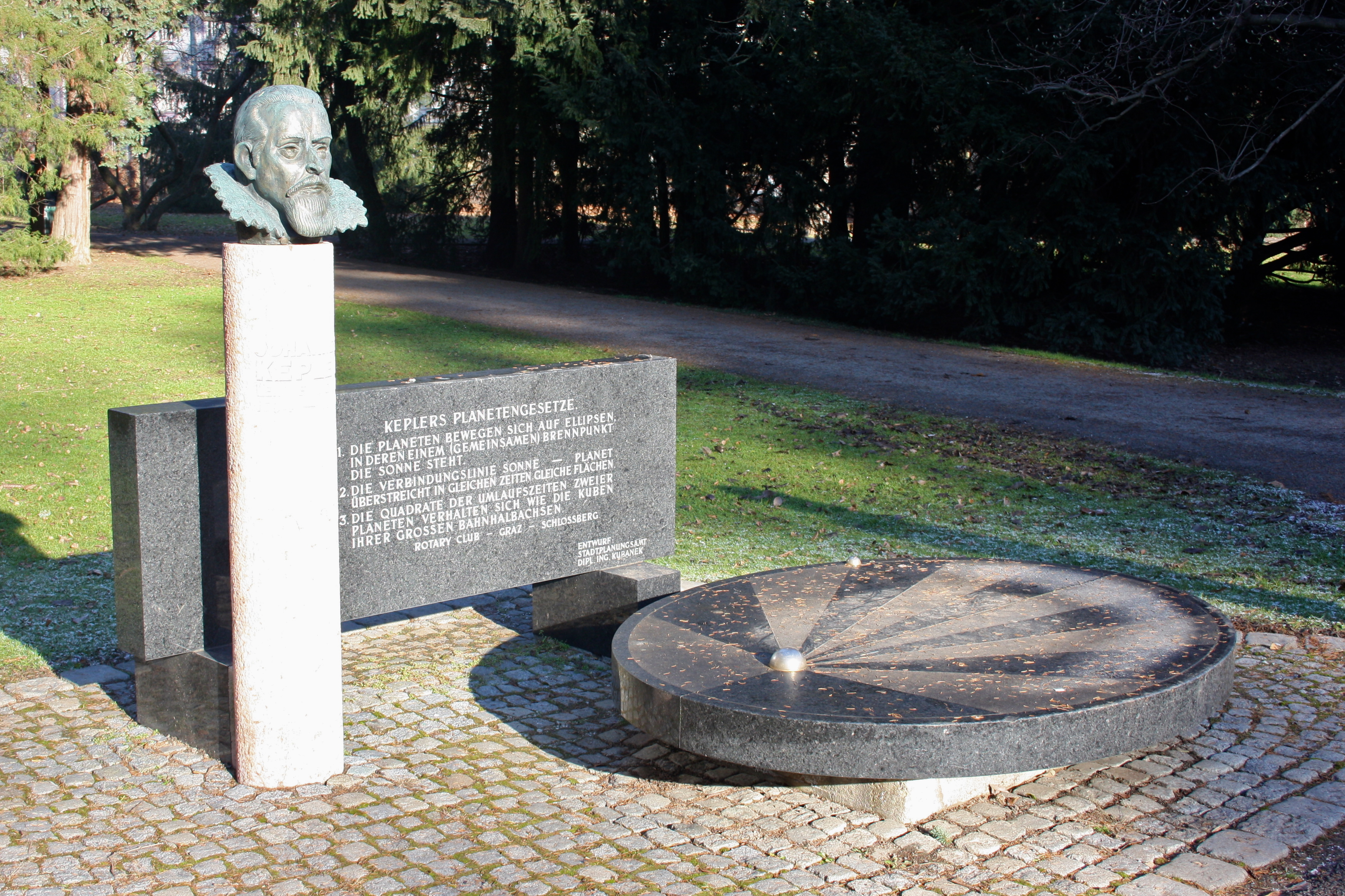 Johannes-Kepler-Denkmal (1963) von Alfred Pirker, Grazer Stadtpark.